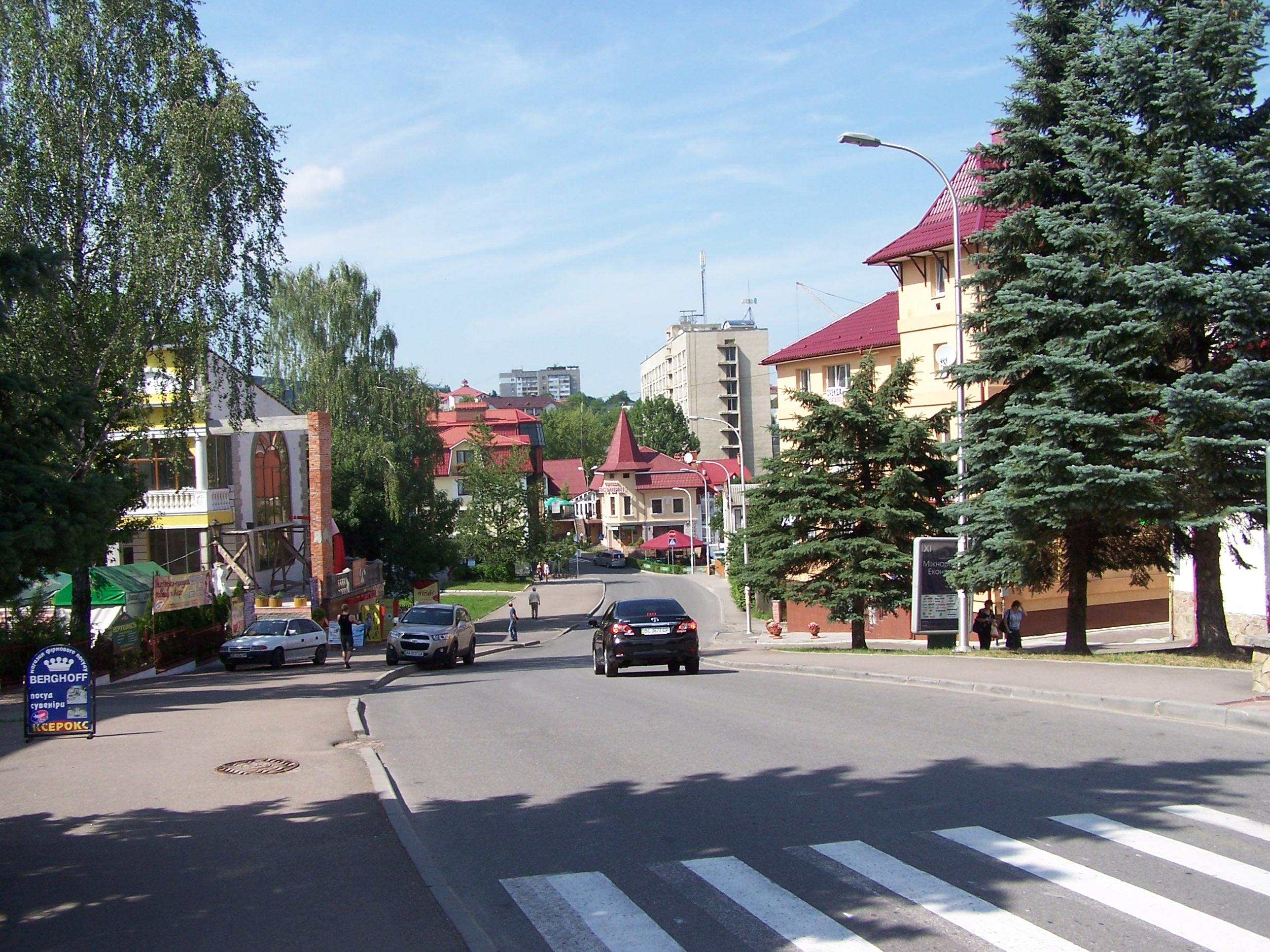 Truskawiec centrum